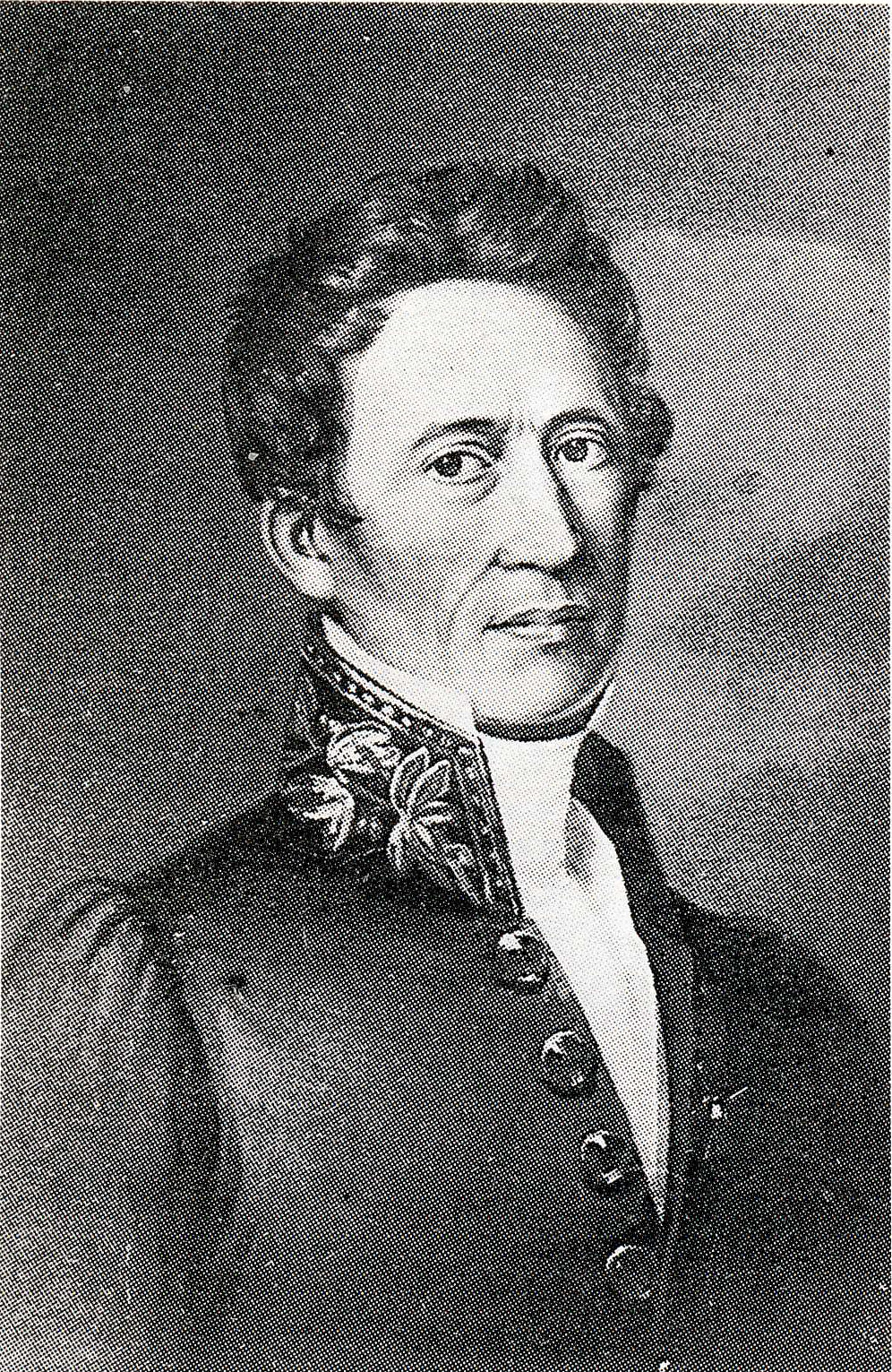 professor Johan Jakob Tengström (1787–1858).